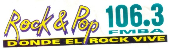 Antiguo logo de la radioemisora Rock & Pop de Argentina